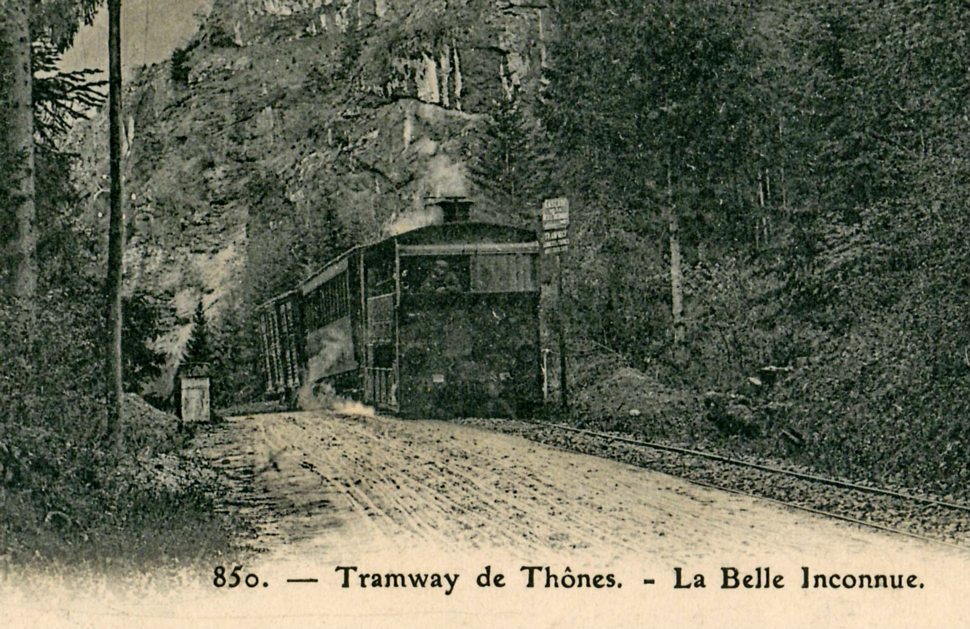 Détail d'une carte postale ancienne éditée par Pittier à Annecy, n°850 :Tramway de Thônes - La Belle Inconnue